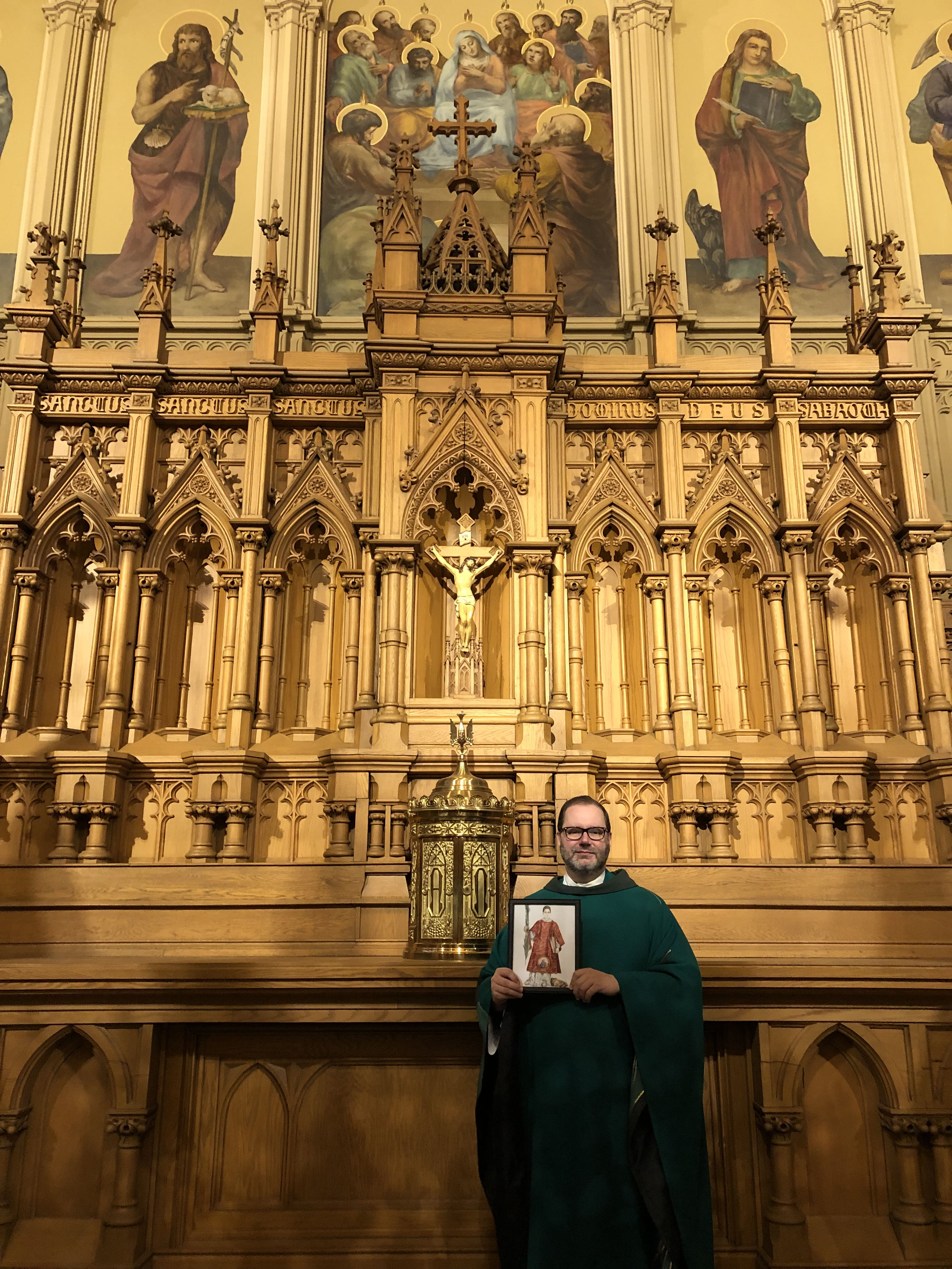 Dubuque (Iowa), Cathedral of St. Raphael and St. Patrick Church, Fr. Greg Bahl espone l'icona "Caesarius Diaconus" accanto al reliquiario di San Cesario